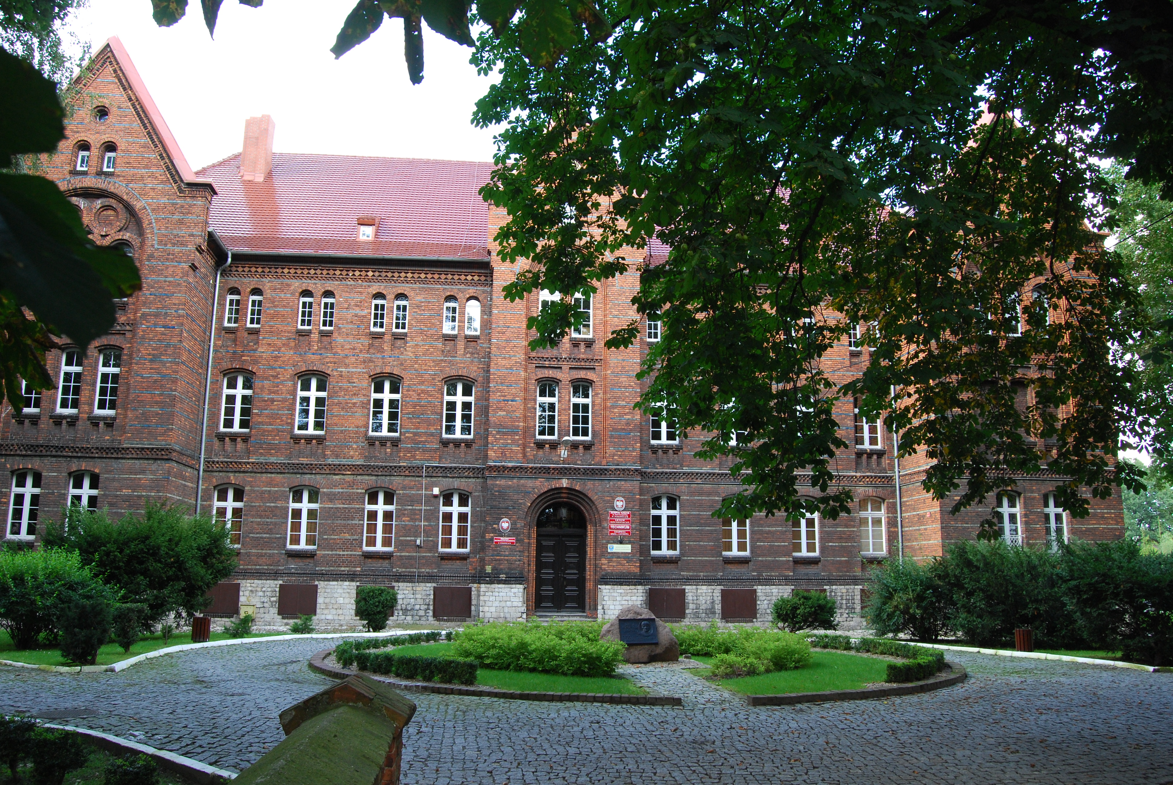 Pyskowice, ul. Wyszyńskiego 37 - kompleks budynków zespołu szkół im. Marii Konopnickiej: budynek główny, budynek sali gimnastycznej (zabytek nr A/1511/92 z 21.12.92)